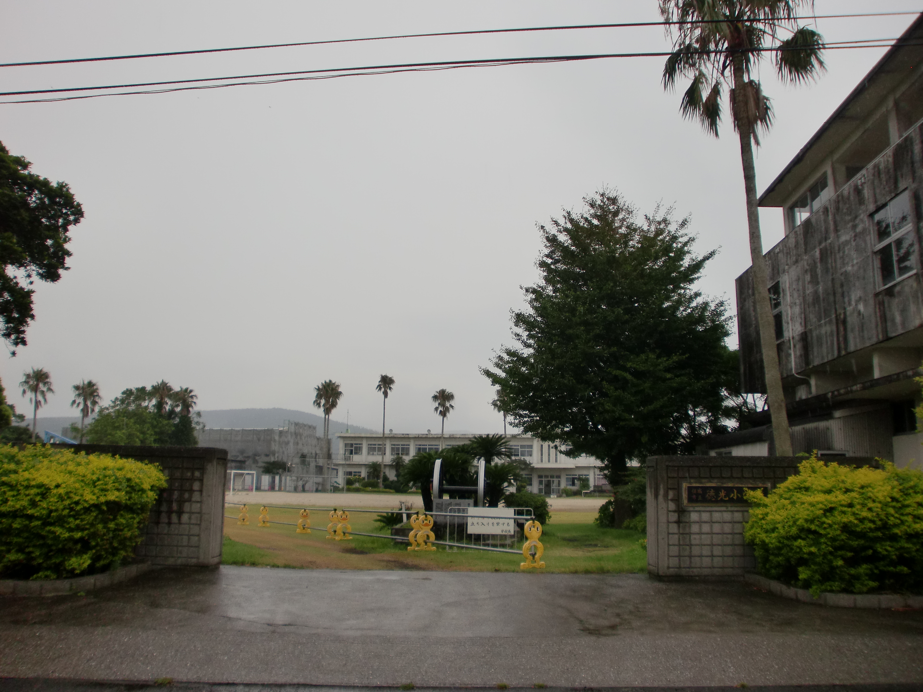 指宿市立徳光小学校の外観。